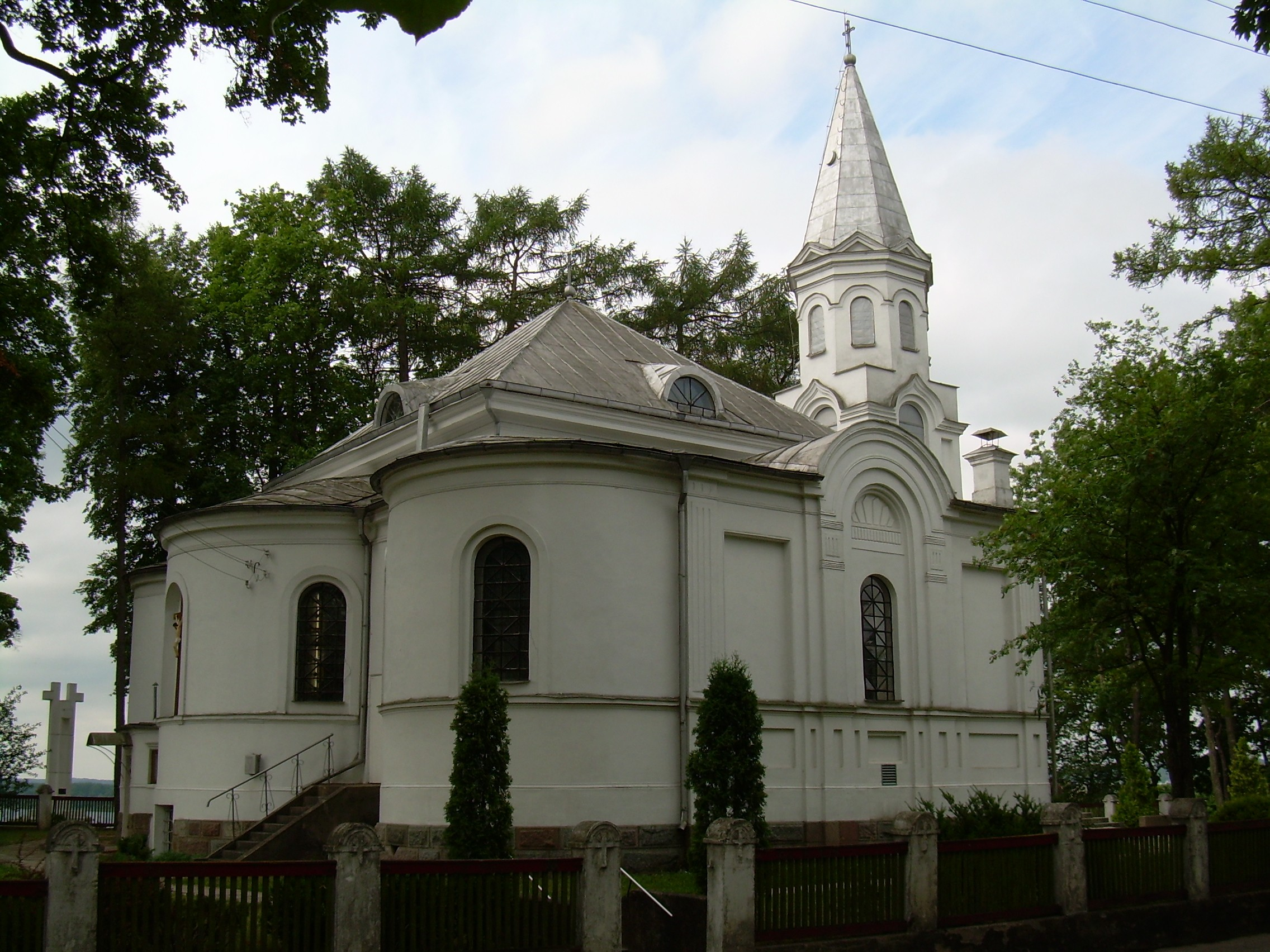 Telšių Švč. Mergelės Marijos Ėmimo į dangų bažnyčia